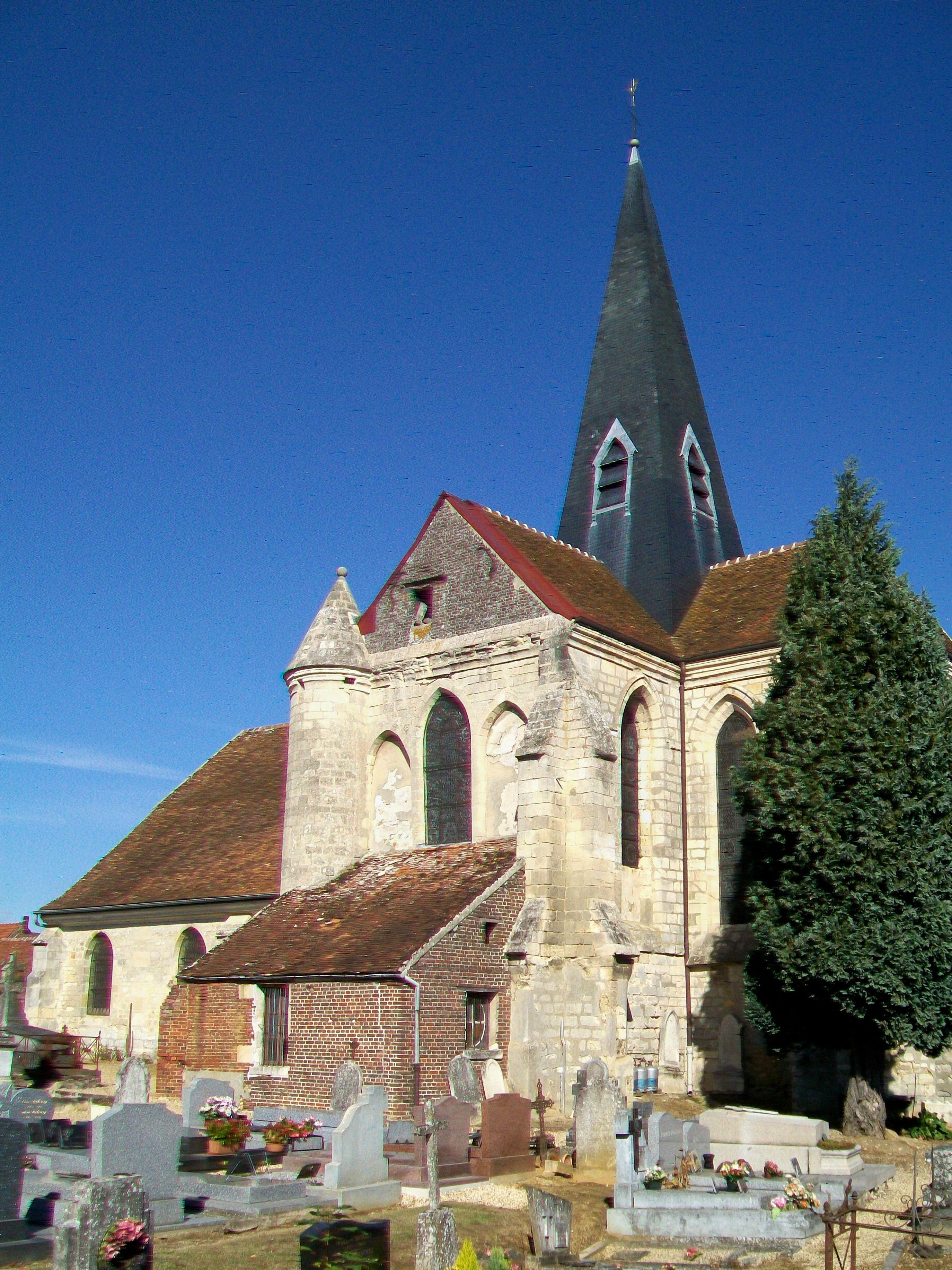 Vue de l'église depuis le cimetière, au sud.